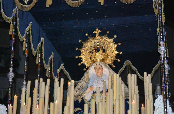 Nuestra Señora de los Dolores que procesiona el Jueves Santo en la Noche-Madruga' de Santa Coloma de Gramanet.